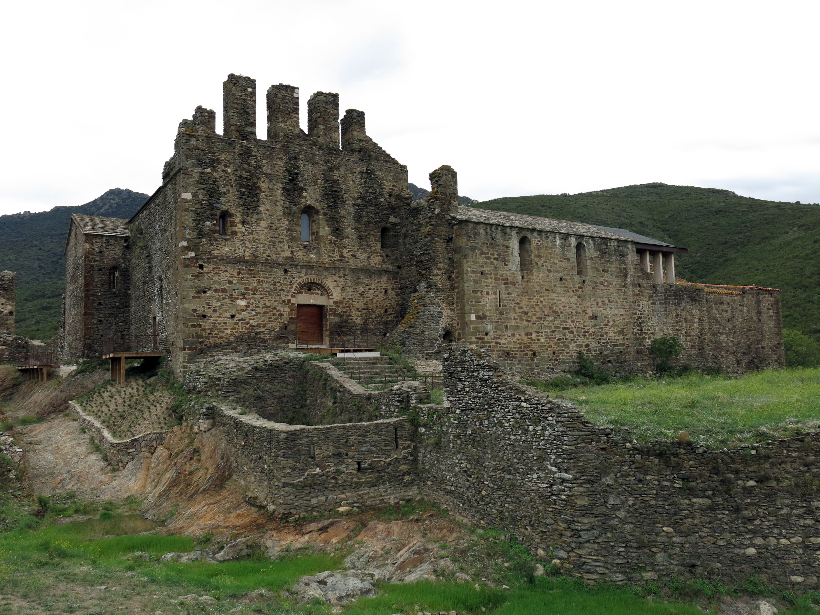 Conjunt monàstic de Sant Quirze de Colera (Rabós)